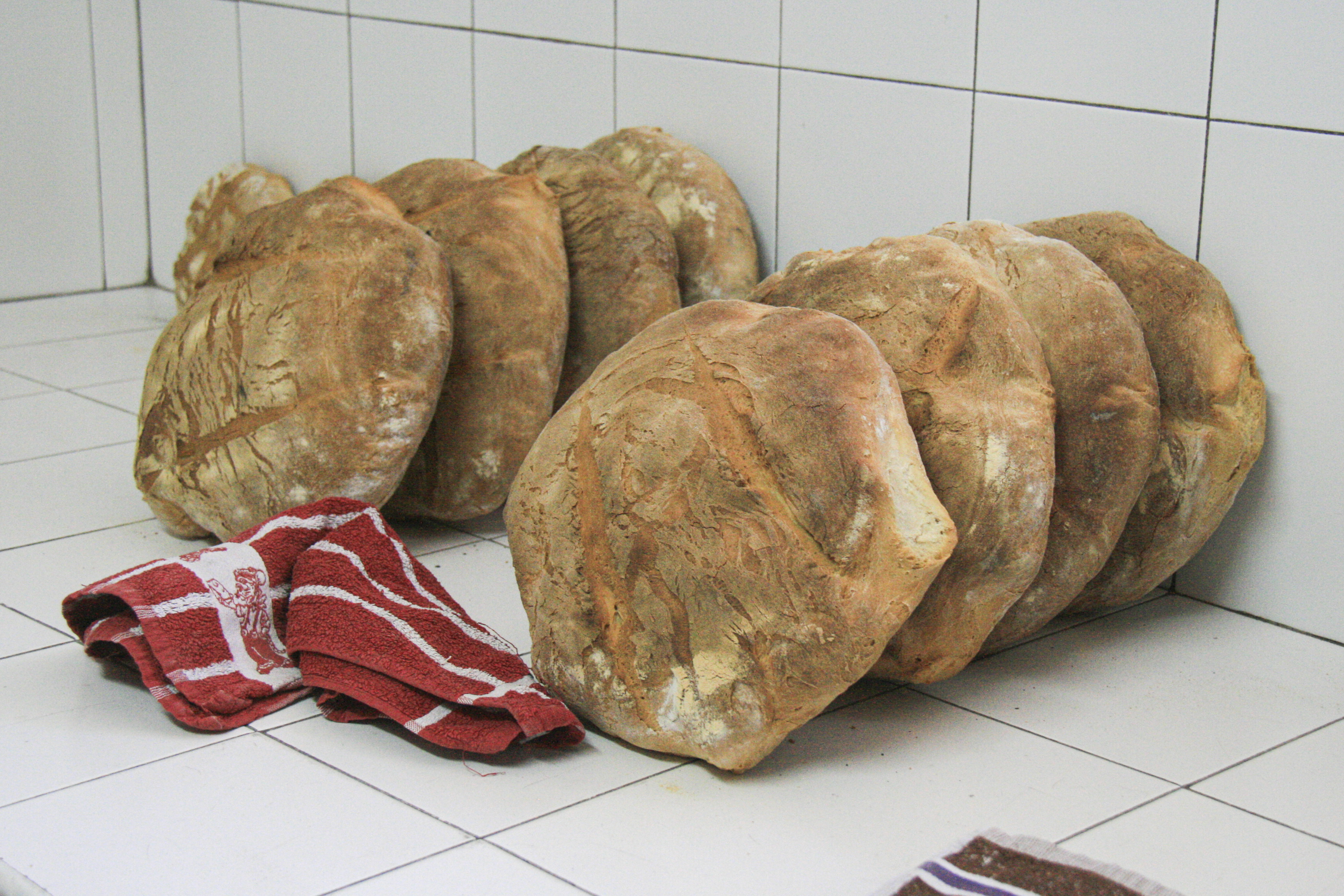 Panes recién horneados (Hogazas)